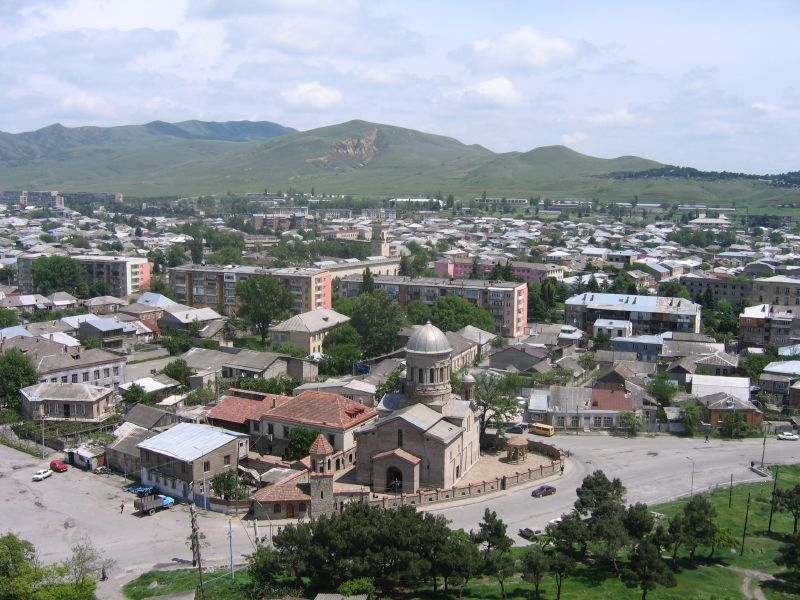 Panorama města Gori v Gruzii